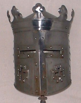 Replik eines Topfhelms mit Verstärkungen und Verzierung Replika kbelcové přilby z německé wikipedie.